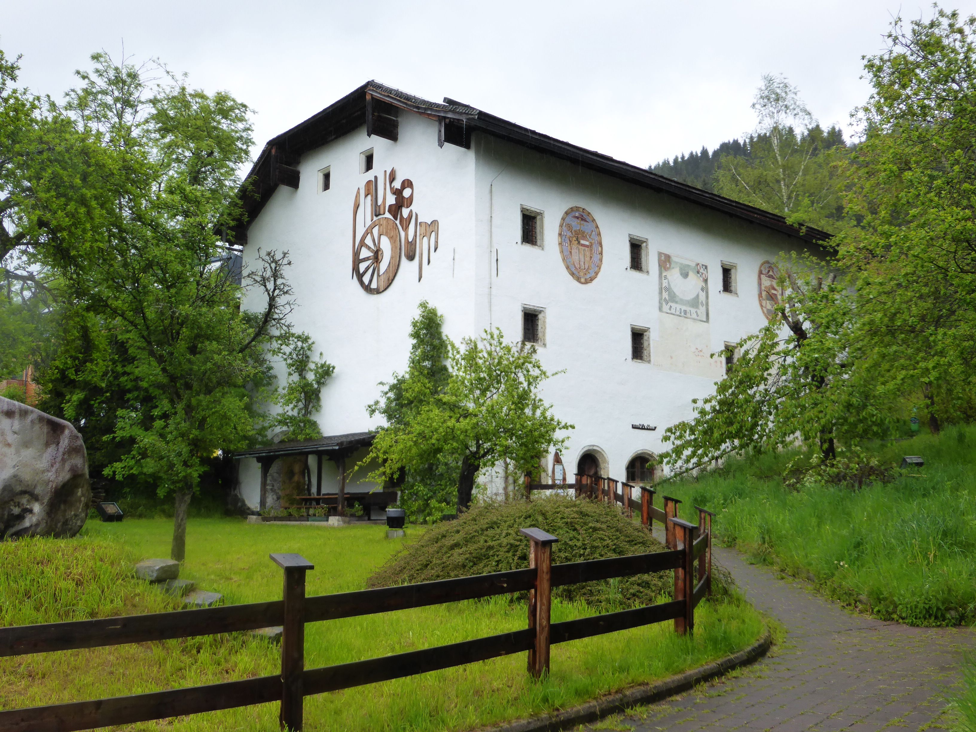 Fürstenkasten; Tauernstraßenmuseum